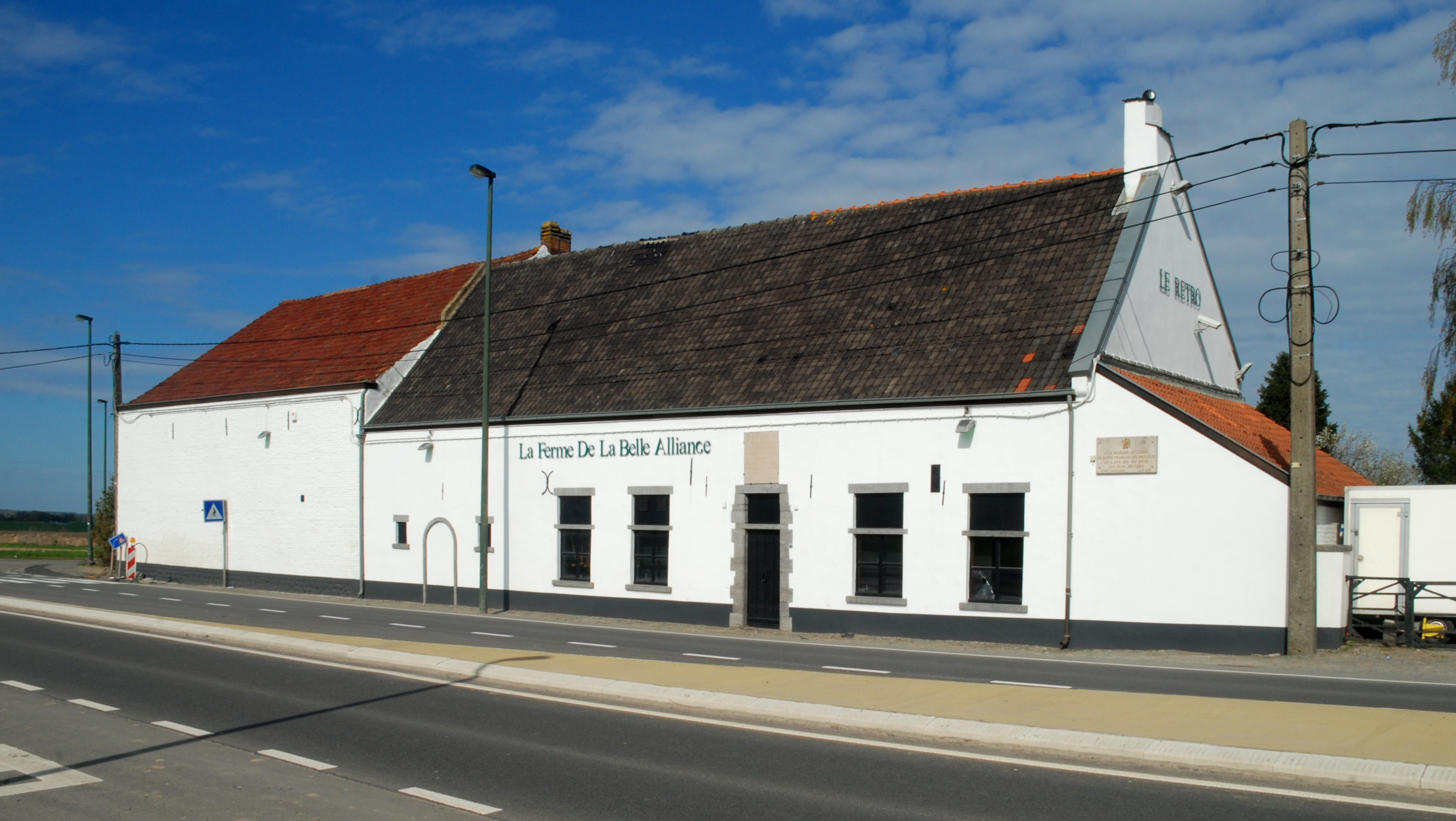 Belgique - Brabant wallon - Lasne - Plancenoit - Ferme de la Belle-Alliance